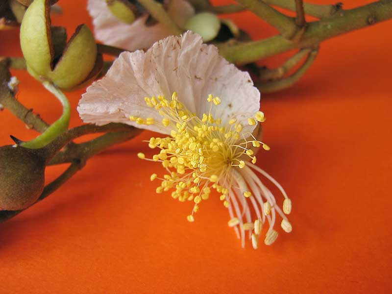 Swartzia polita (R.S.Cowan) Torke